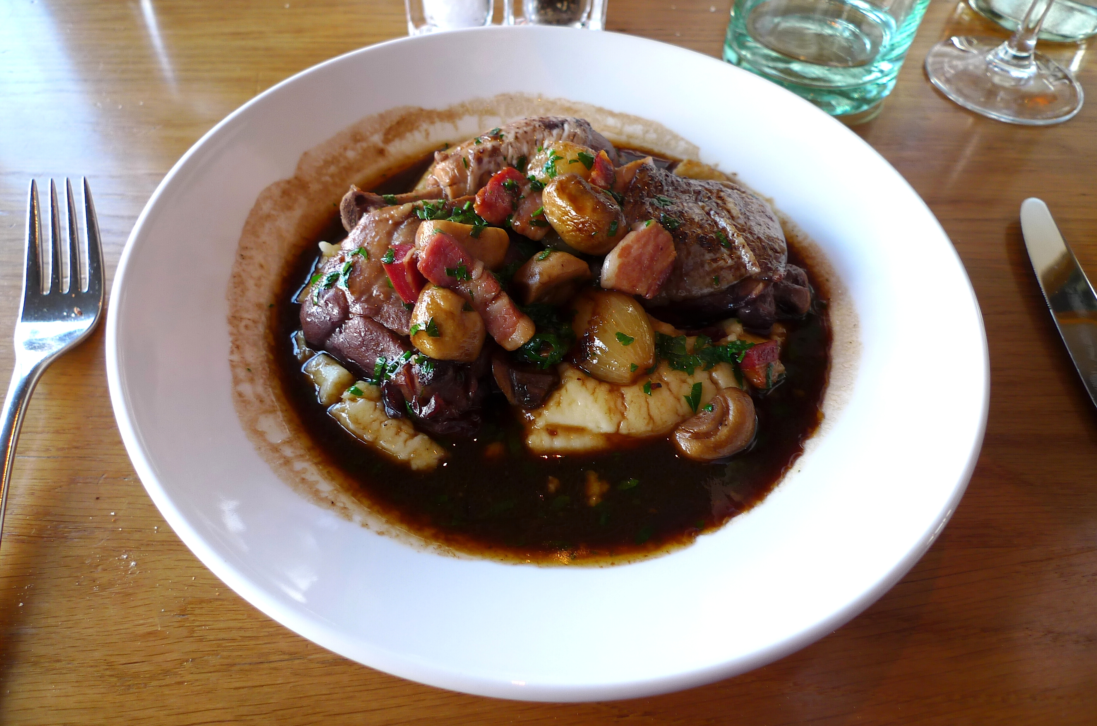 Coq au vin de Bourgogne. (Die klassische Zubereitung beinhaltet u. a. Hahn (z. B. aus der Bresse) in Stücken, Perlzwiebeln, Karotten, Knoblauch, Bouquet garni, Gewürze, Burgunderwein, Marc de Bourgogne, durchwachsener und gewürfelter Speck, Champignons, frisch gehackte Petersilie.)